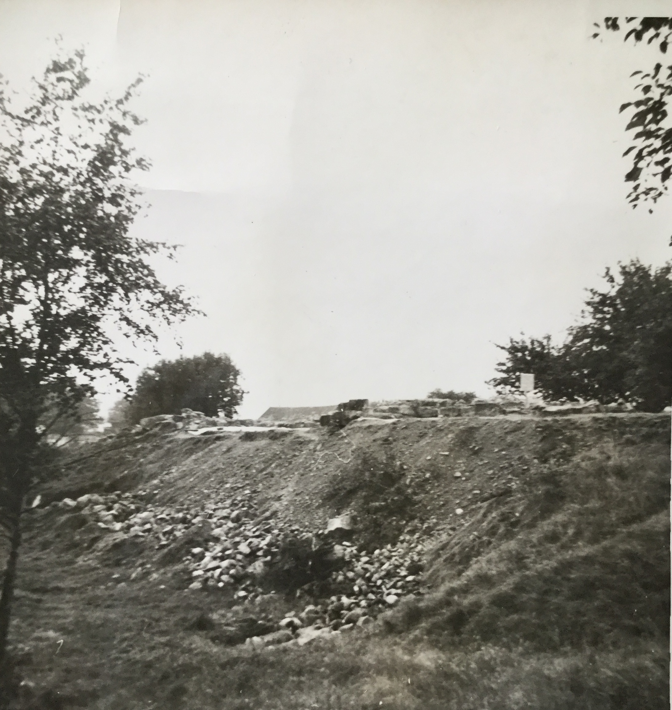 Utgrävning av kyrkoruin